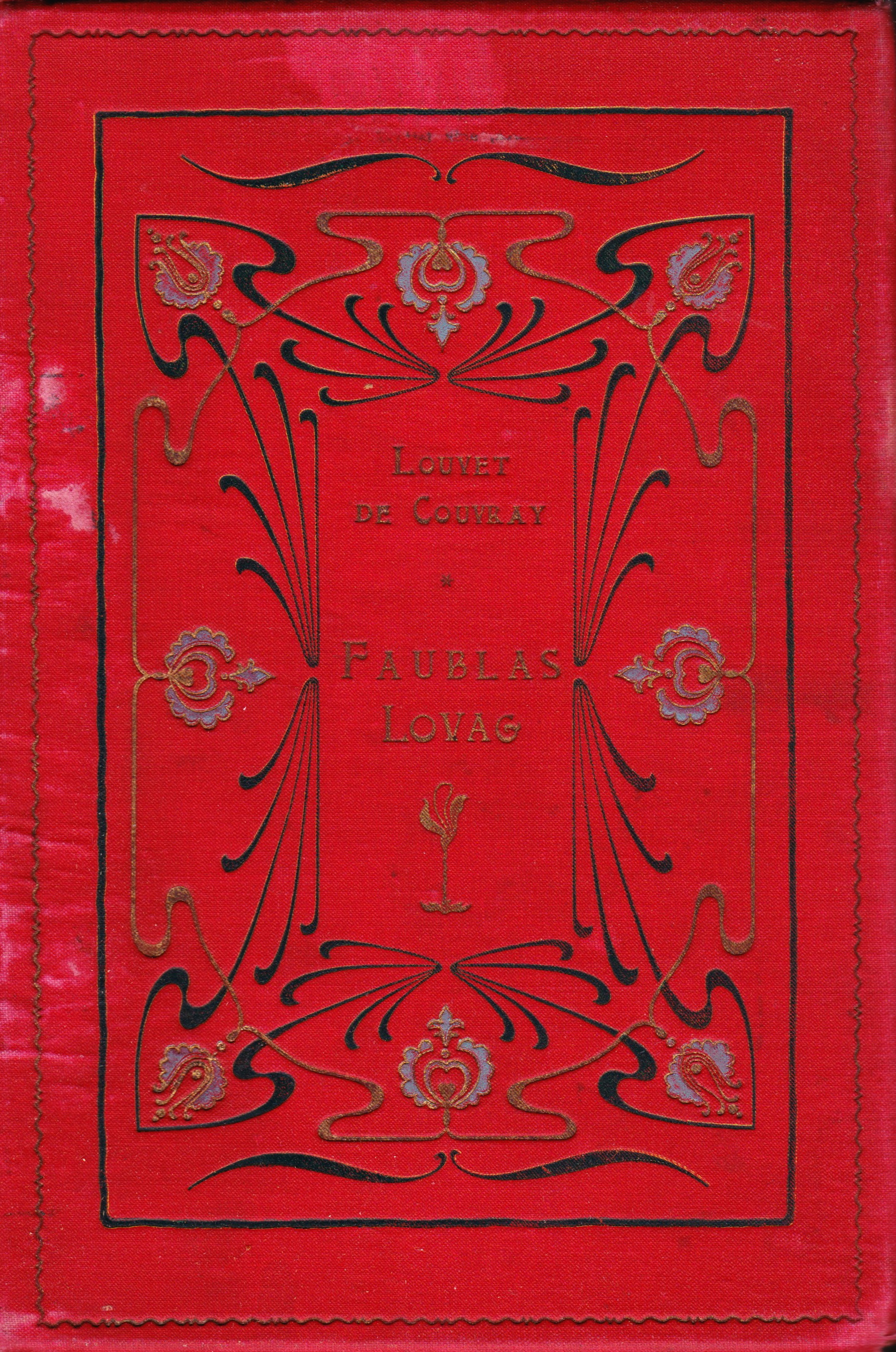 Louvet de Couvray: Faublas lovag, 1900, a borítódísz tervező nem ismert